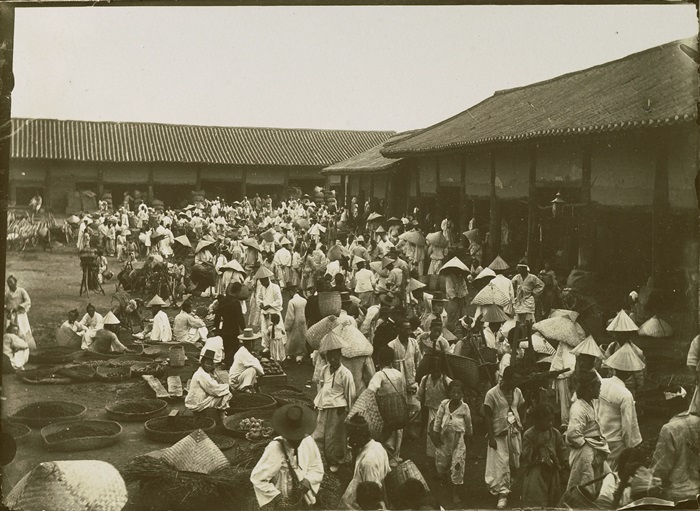 朝鲜李朝末年的市场